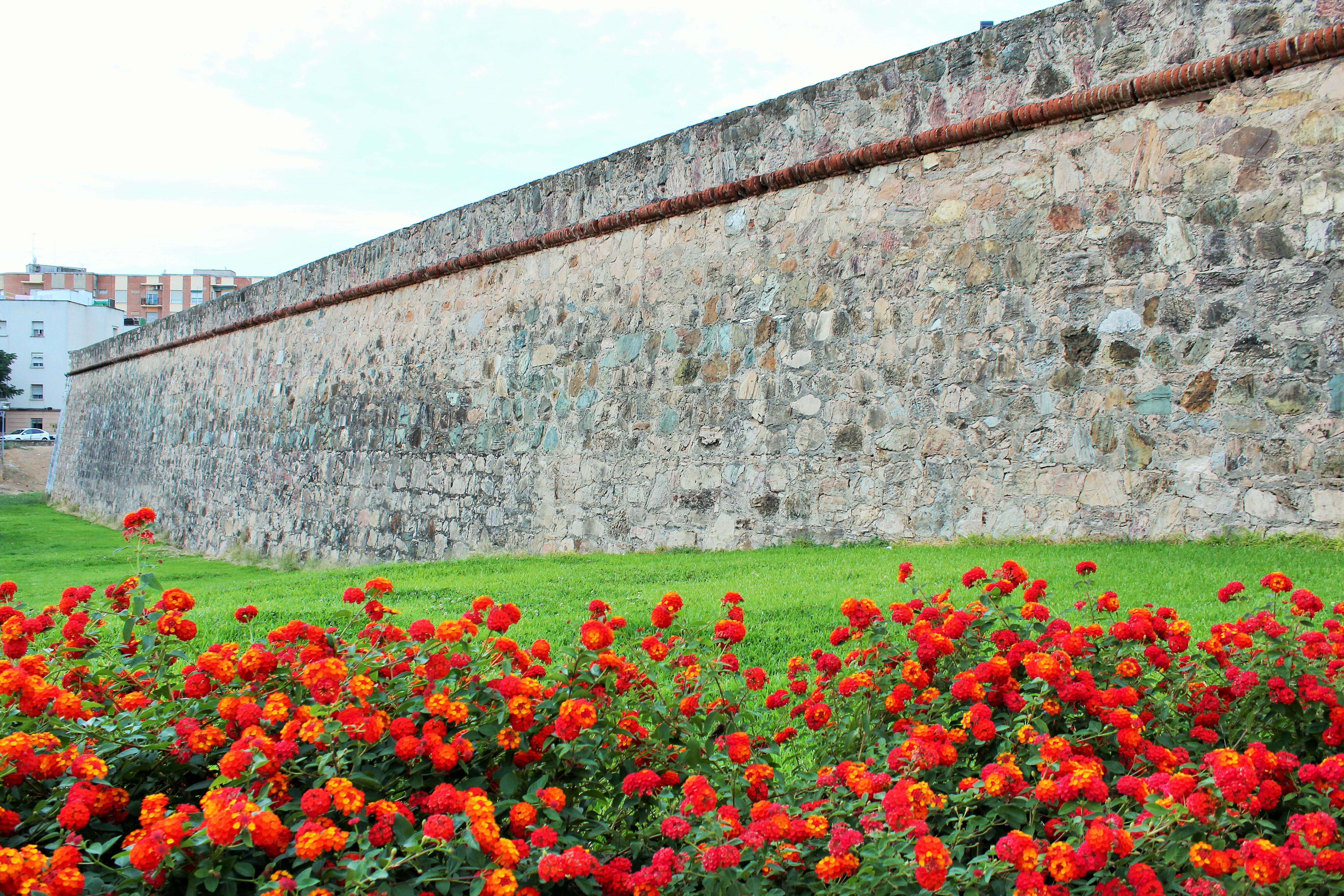 Recinto abaluartado de Badajoz. Baluarte de Santiago. Lienzo de muralla sur-oeste.